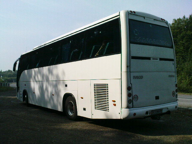 задня панель Euroridera